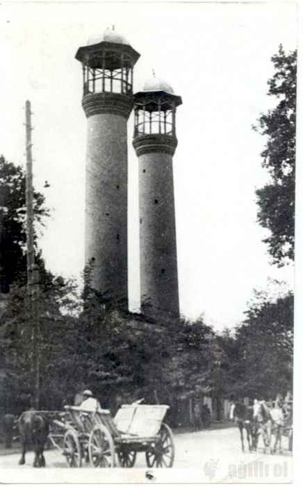 Gəncədəki Şah Abbas məscidi XIX əsrdə